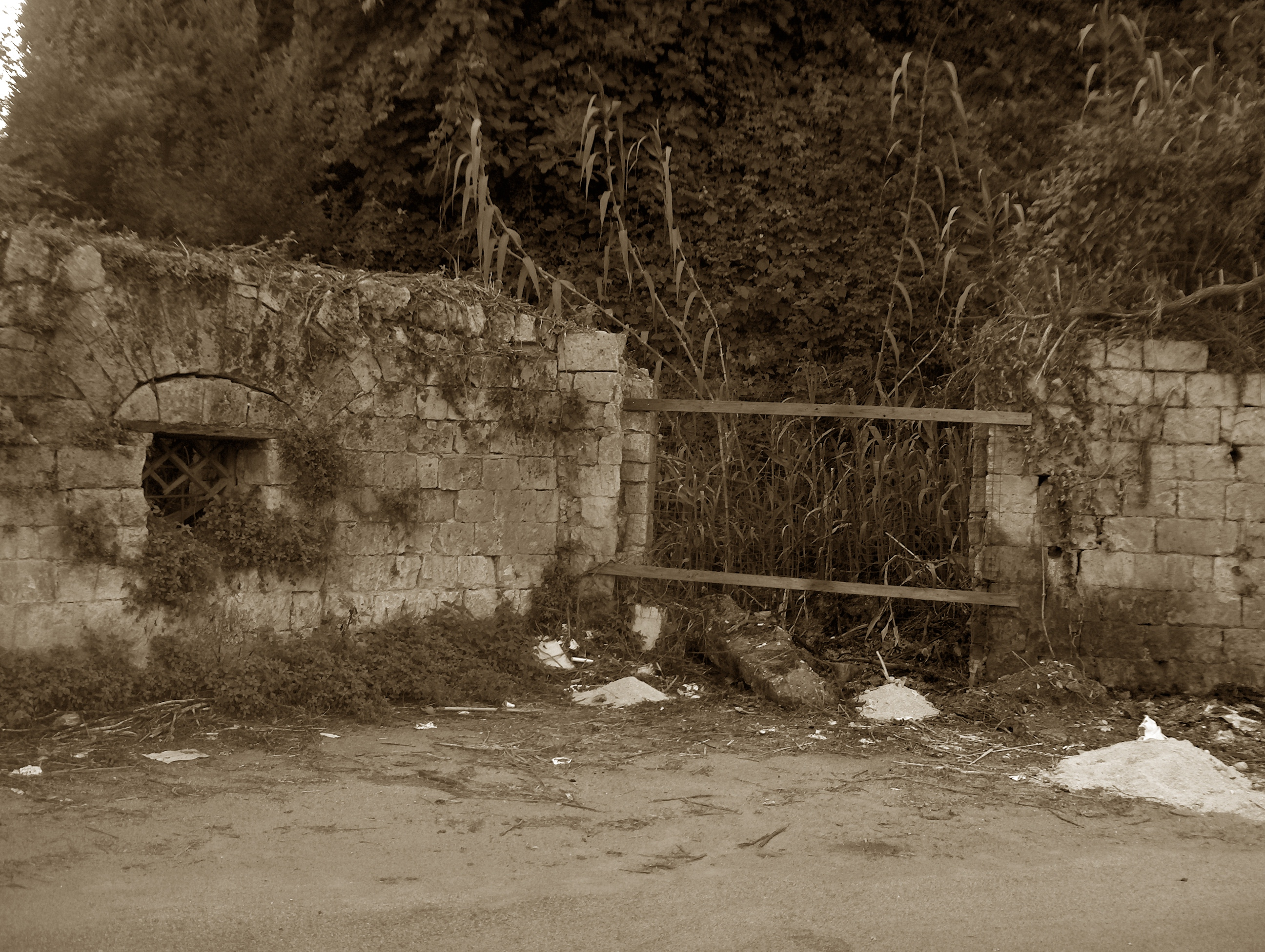 altra prospettiva dei ruderi